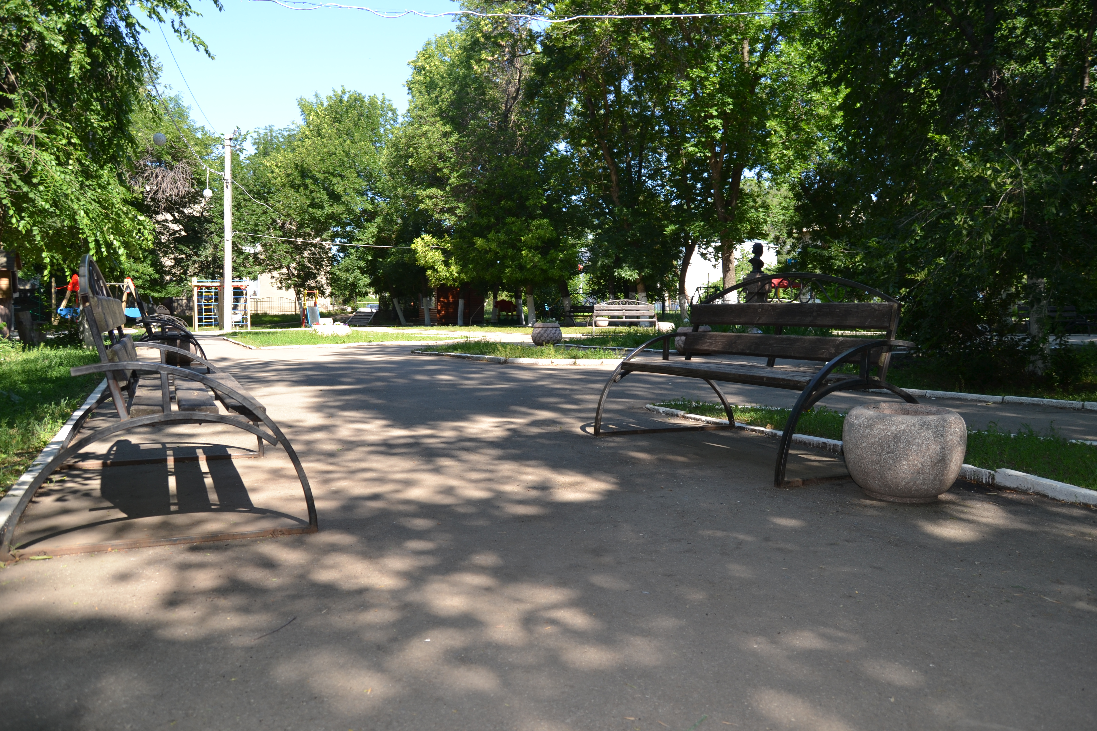 Изображение населённого пункта. Поселковый парк (Расково)